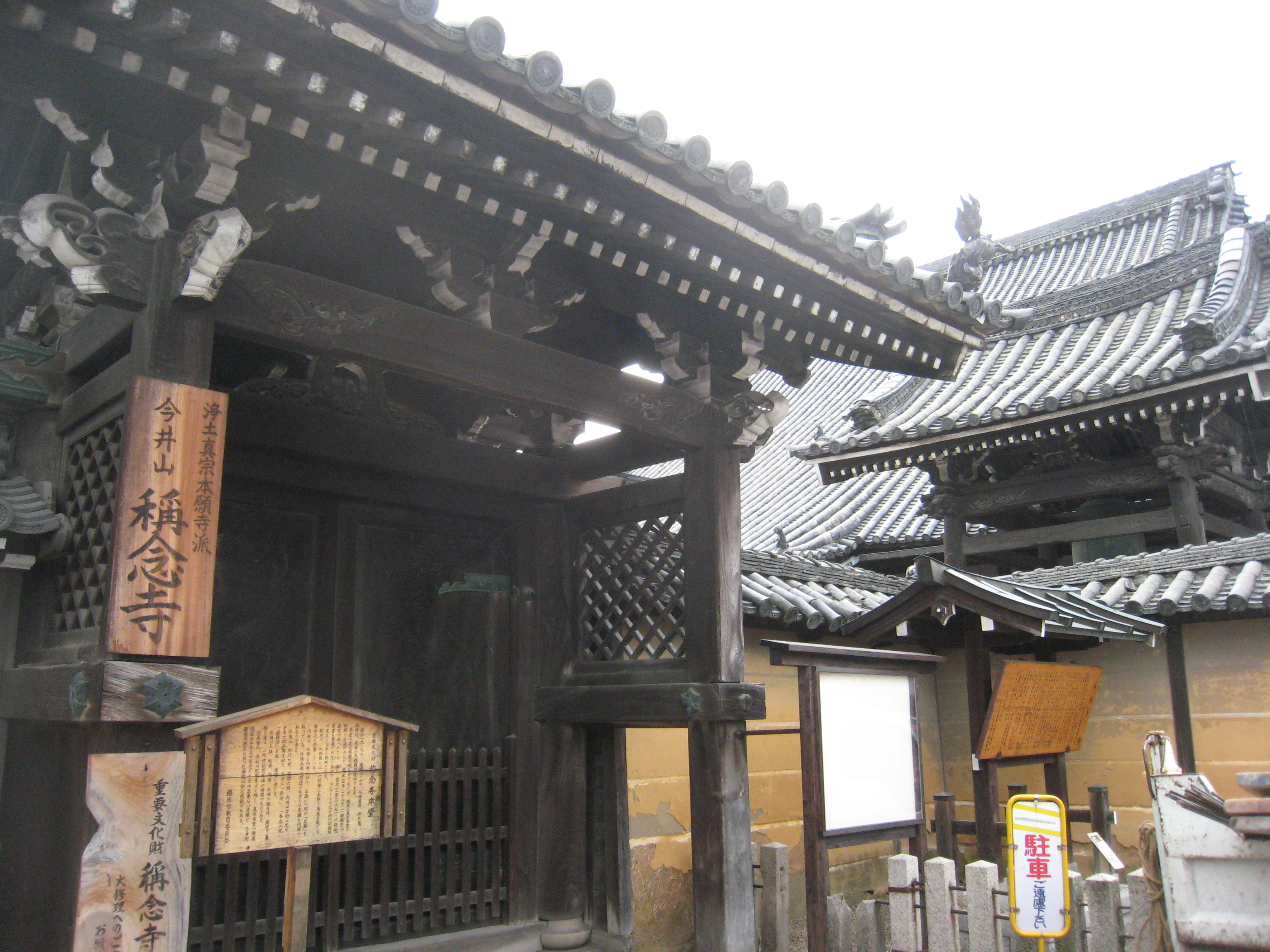 一向宗今井御坊